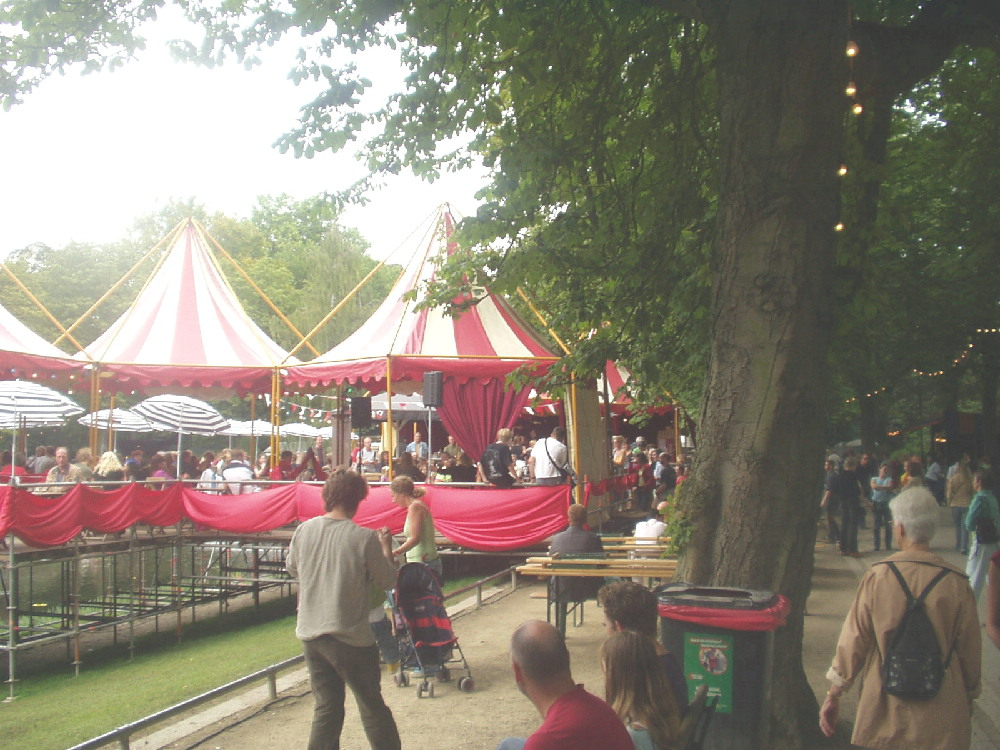 By Noorderzon yn 2005.